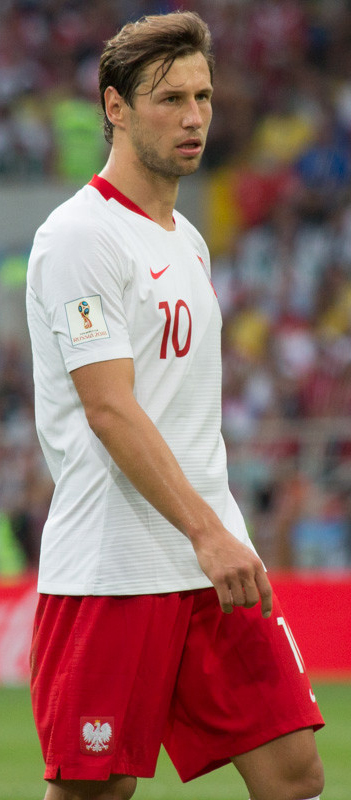 Польша неожиданно проиграла Сенегалу